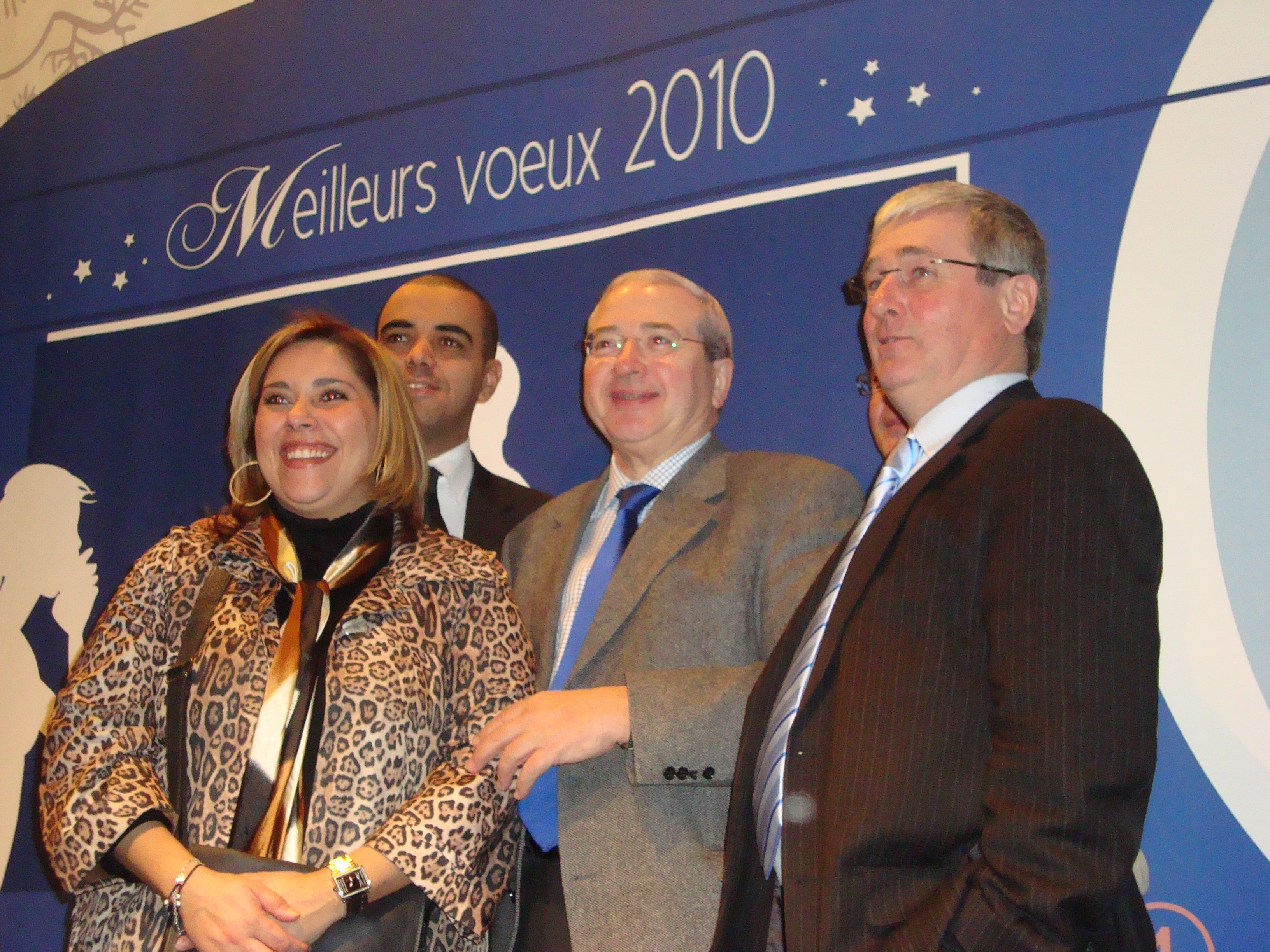 Sonia Bennaceur, Abdelhak kachour, Jean-Paul Huchon et Michel Fourcade